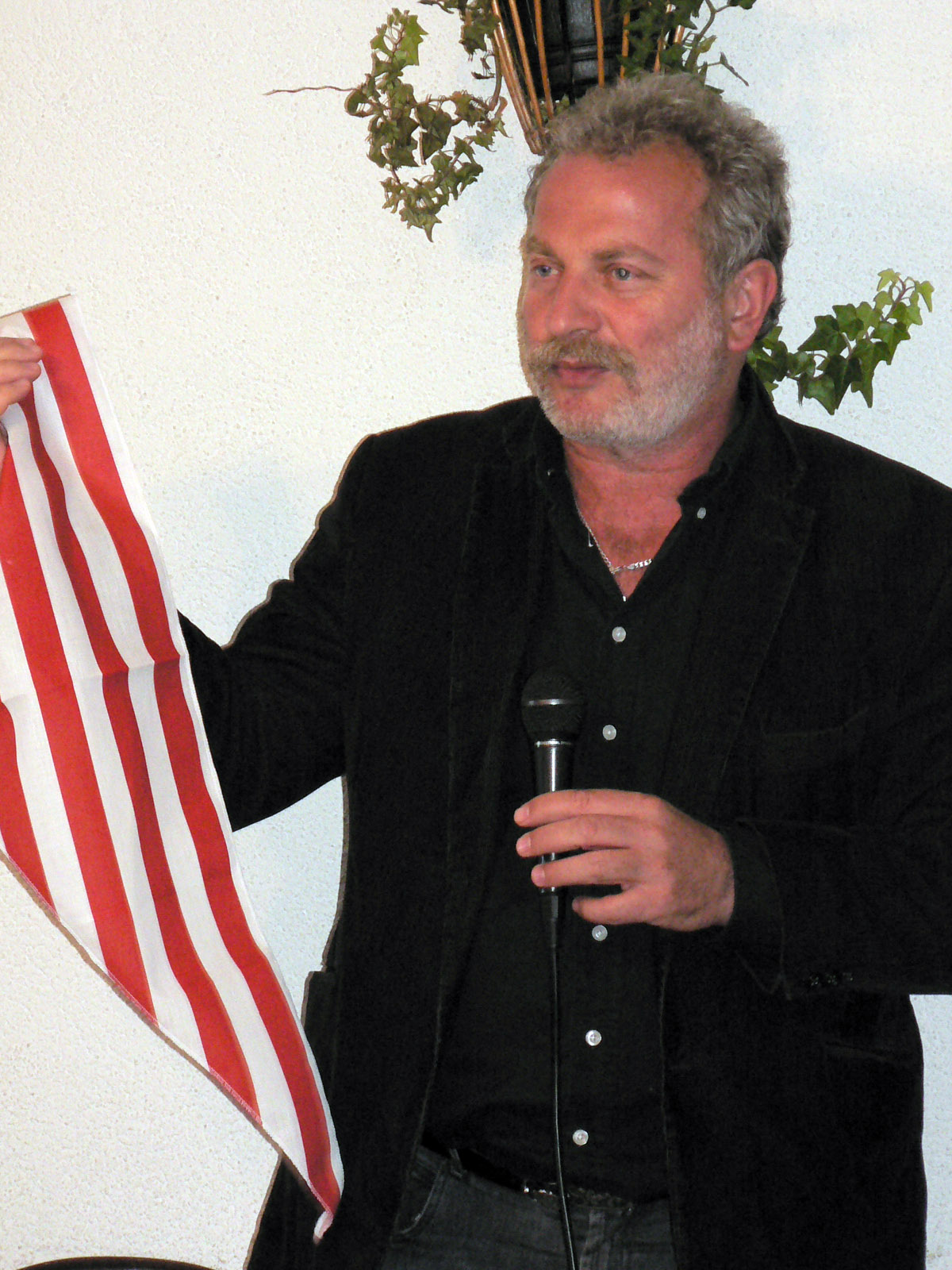 Bencsik András előadása a Solymári Konzervatív Körben 2007-ben